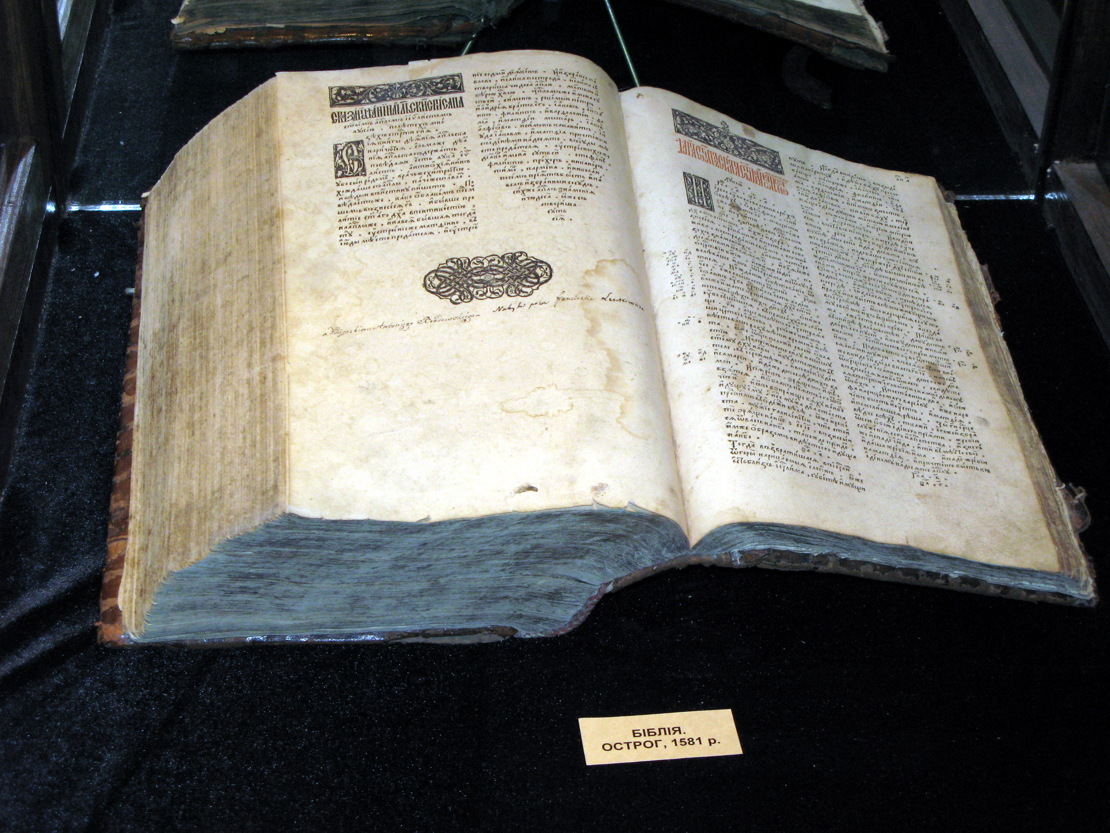 Замок князiв Острозьких (мур.), Острог, вул.Замкова, 5